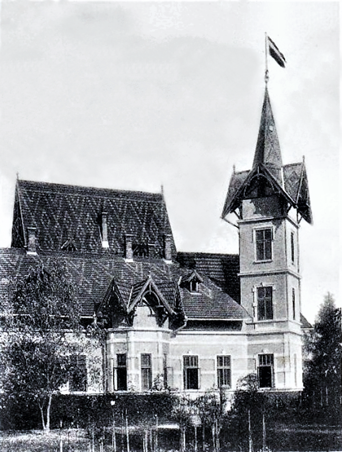 Schloss Berhometh um 1900, Schloss der Freiherren, später Grafen Wassilko von Serecki